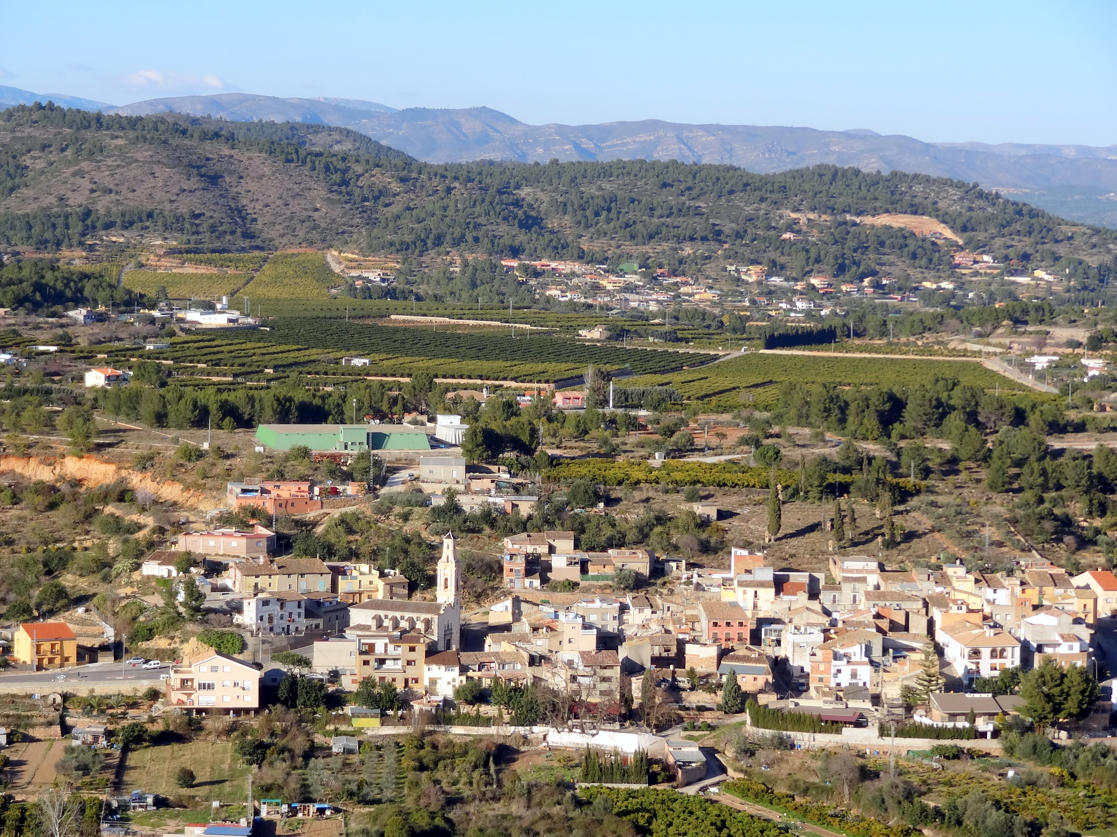 Vista general d'Artesa, Plana Baixa, País Valencià. Nucli de població pertanyent a la municipalitat d'Onda